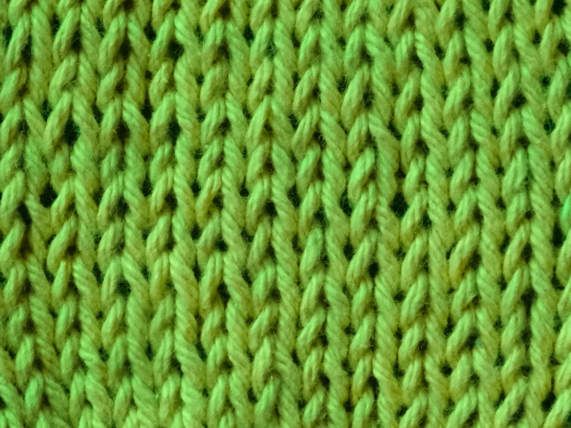 Stricken: glatt rechts gestrickt, Rechts-Ansicht